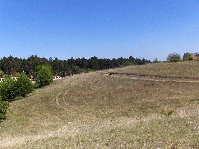 Paysage de la Deliblatska peščara, une réserve naturelle de Voïvodine, en Serbie